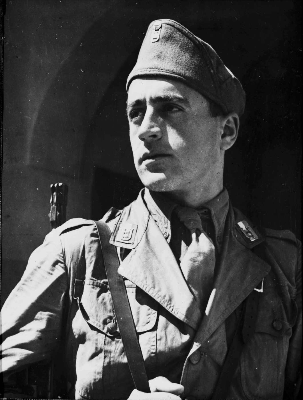 Propagandabild aus Kroatien, Ustascha-Soldat mit Gewehr